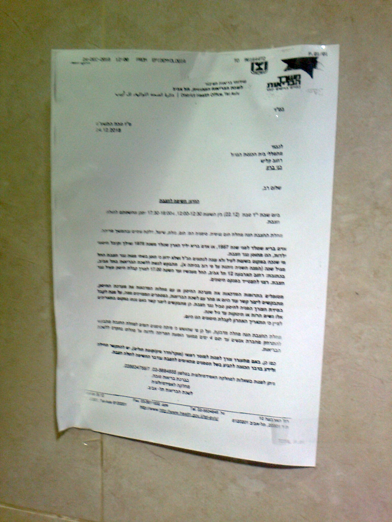 מודעה על חשיפה לחולה חצבת